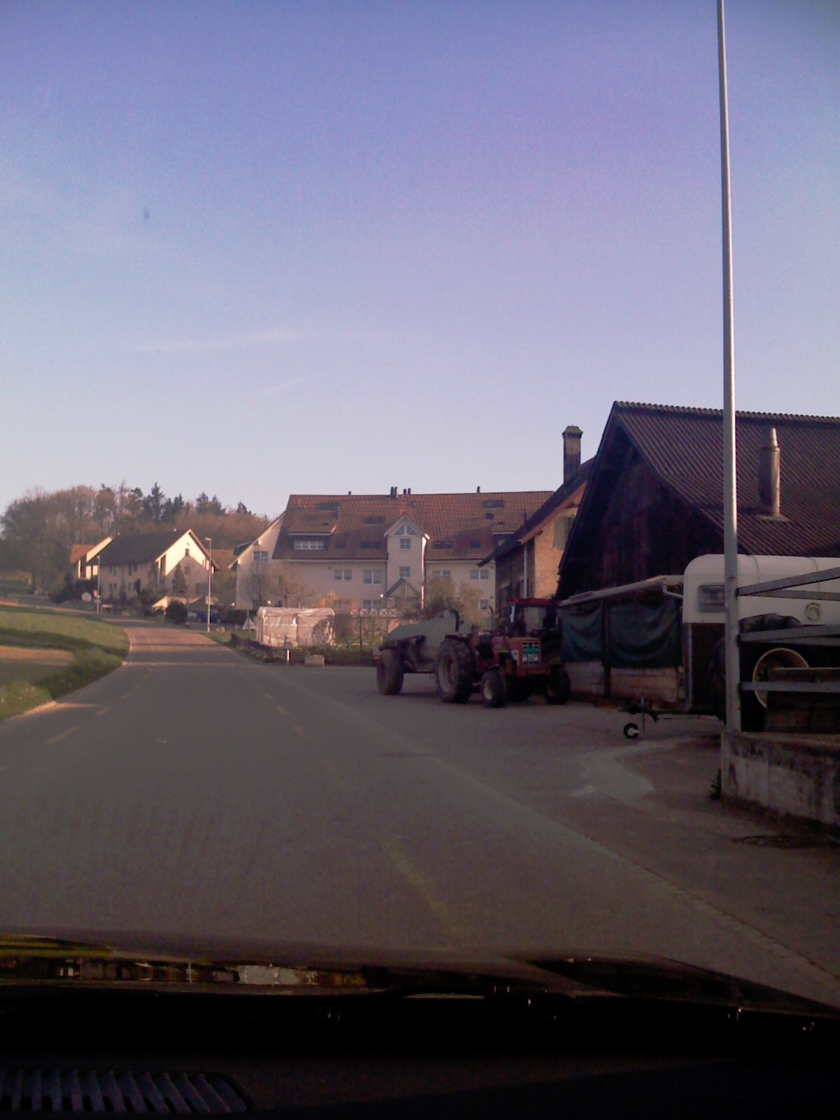 Setlejo Islikon, komunumo Gachnang, Kantono Zuriko, Svislando